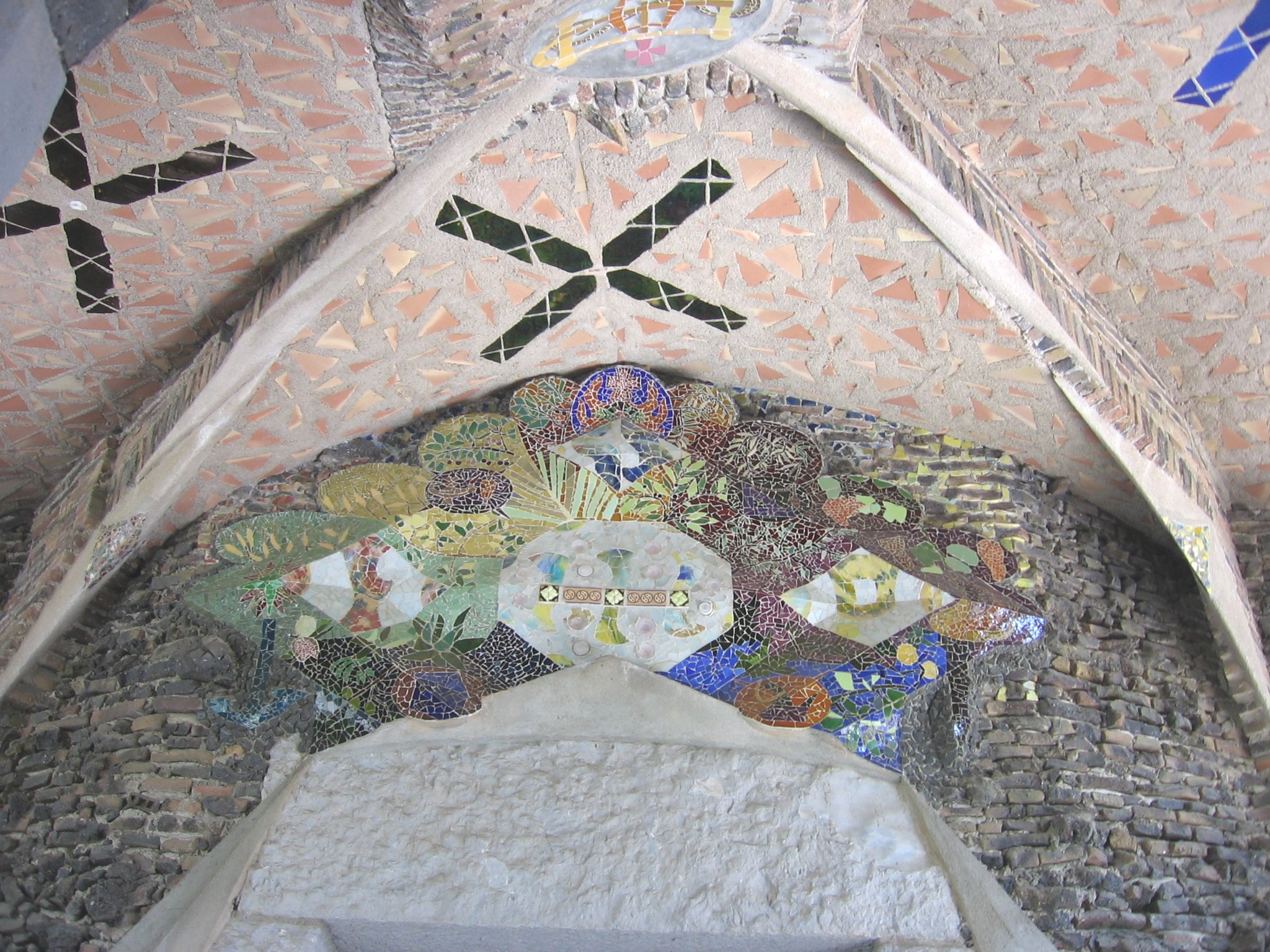 Cripta de la Colonia Güell, de Antoni Gaudí (Santa Coloma de Cervelló)